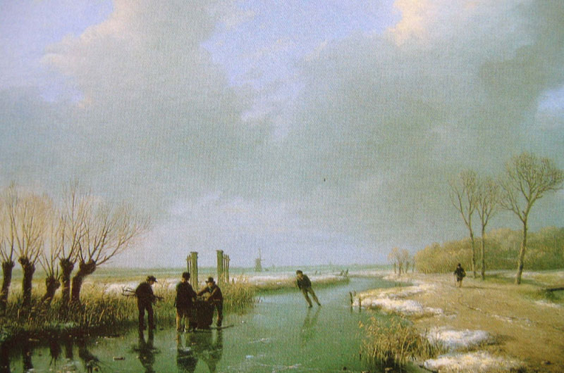 Andreas Schelfhout (1787-1870), ca. 1850 Afbeelding